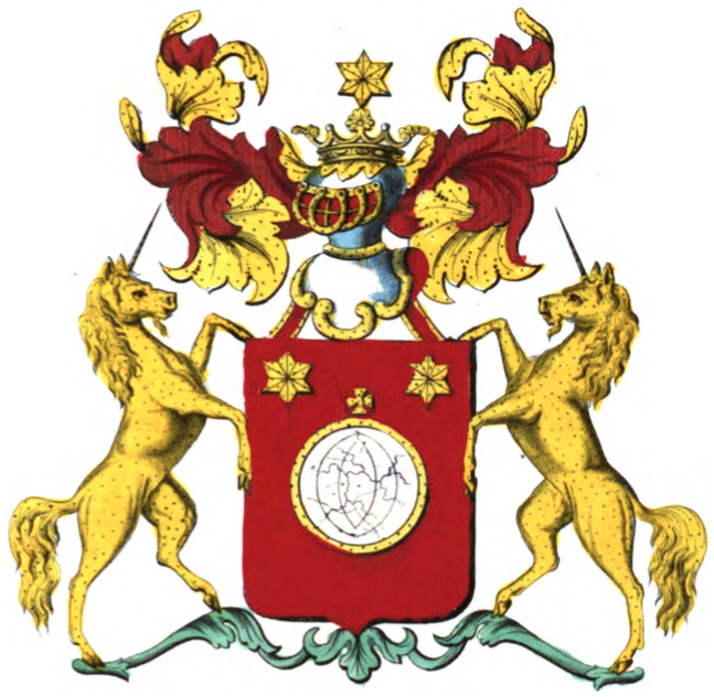 Armoiries de la famille de Thibaut de Boesinghe